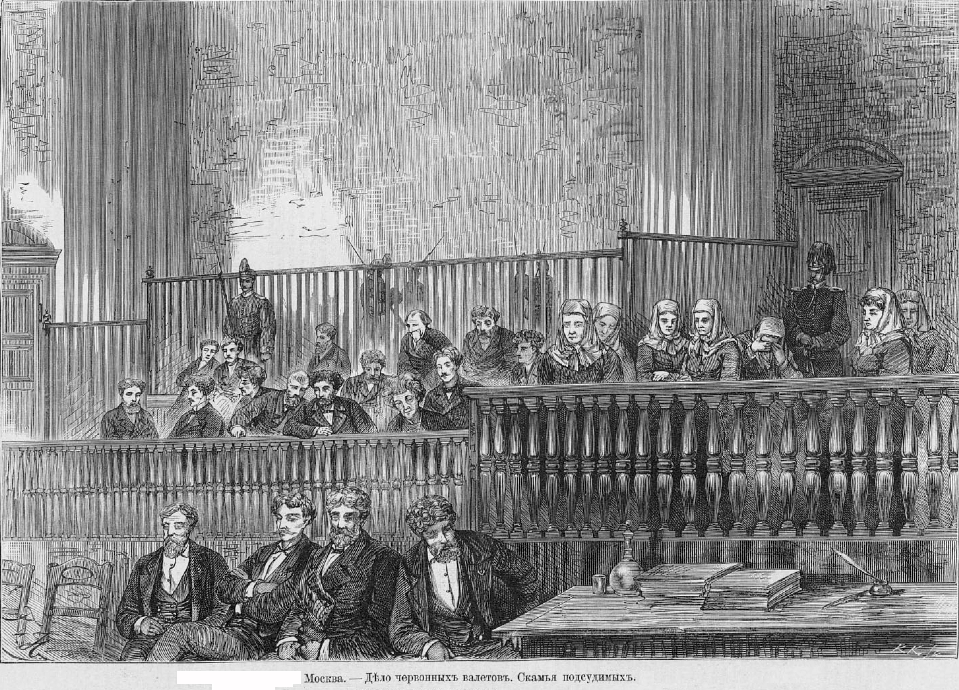 Дело червонных валетов, скамья подсудимых, 1877 год